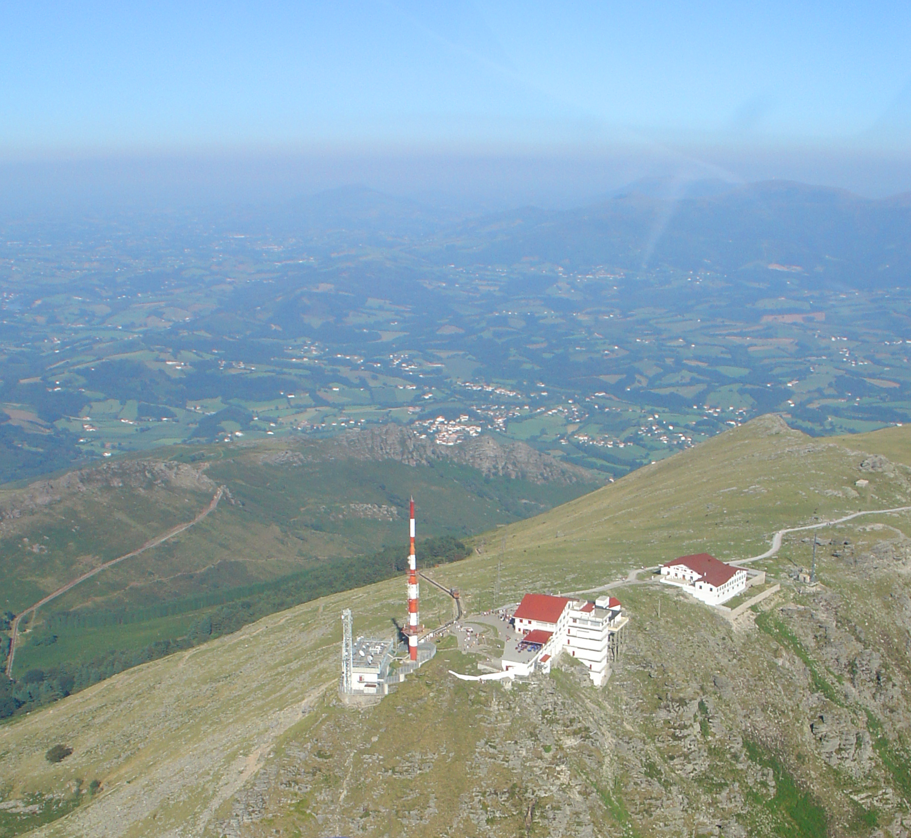 Vue aérienne du sommet de La Rhune montrant les installations qui le couvrent : brasserie, magasins de souvenirs, antenne de transmission. Le "petit train" arrive au sommet à l'instant du cliché.